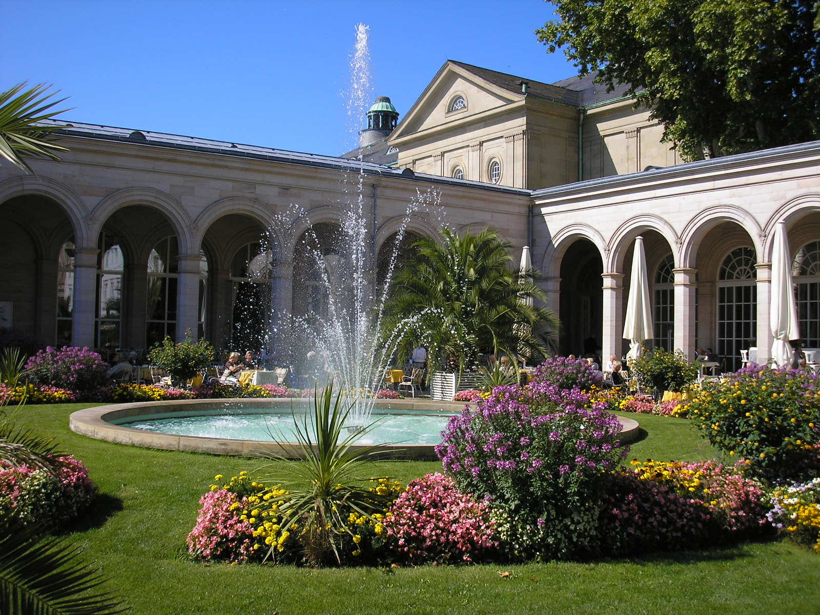 In den Kuranlagen von Bad Kissingen (Unterfranken).